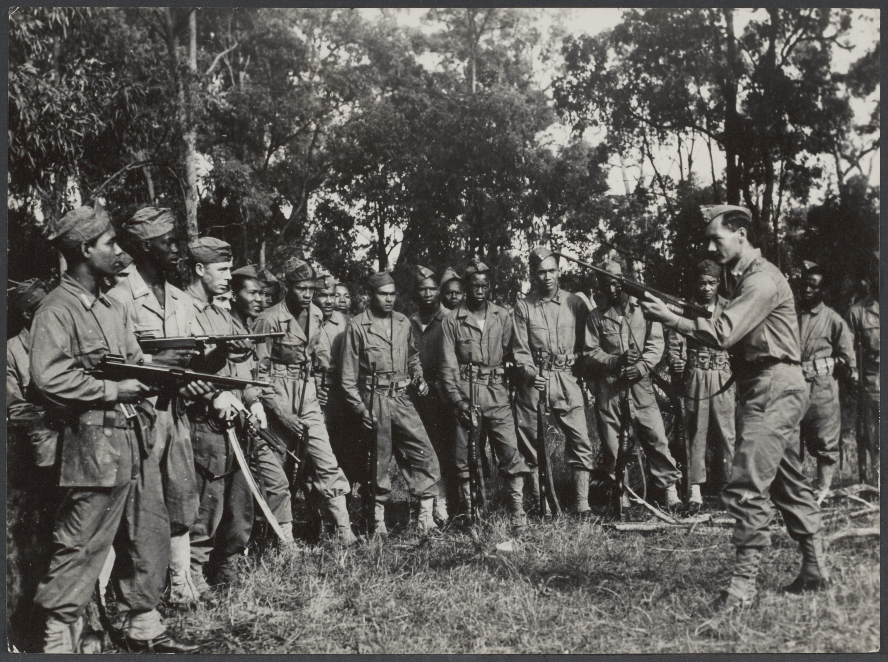 Collectie / Archief : Fotocollectie Spaarnestad Onderwerpen Reportage / Serie : Nederlanders, strijders aan geallieerde zijde Beschrijving : KNIL. Een oefening met machingeweren in een opleidingskamp op Nieuw-Guinea Annotatie : Te zien zijn een groep soldaten uit West-Indië Datum : juli 1945 Locatie : Nieuw-Guinea Trefwoorden : oorlog, oorlogen Fotograaf : Fotograaf Onbekend / Anefo Auteursrechthebbende : Nationaal Archief Materiaalsoort : Foto (zwart/wit) Nummer archiefinventaris : bekijk toegang 7.000SPAond Inventarisnummer : 29013 Bestanddeelnummer : 29013_013